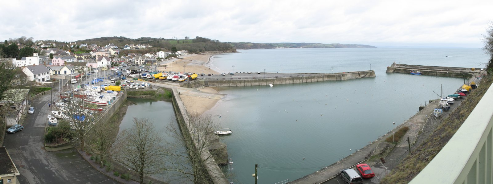 Saundersfoot harbor and village